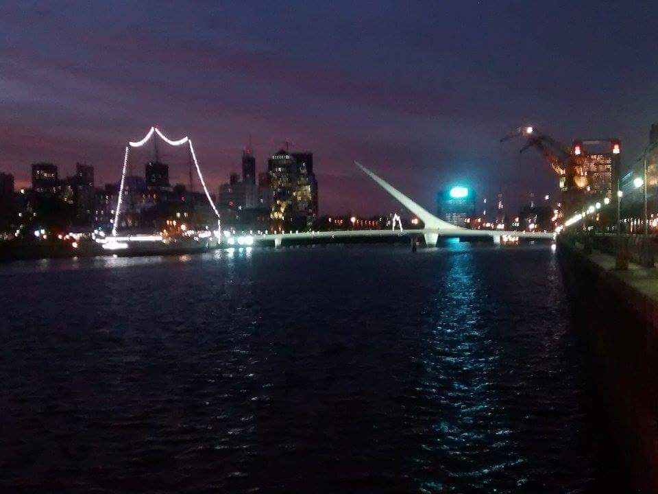 Vista crepuscular del Puente de la Mujer y Puerto Madero desde el sur.